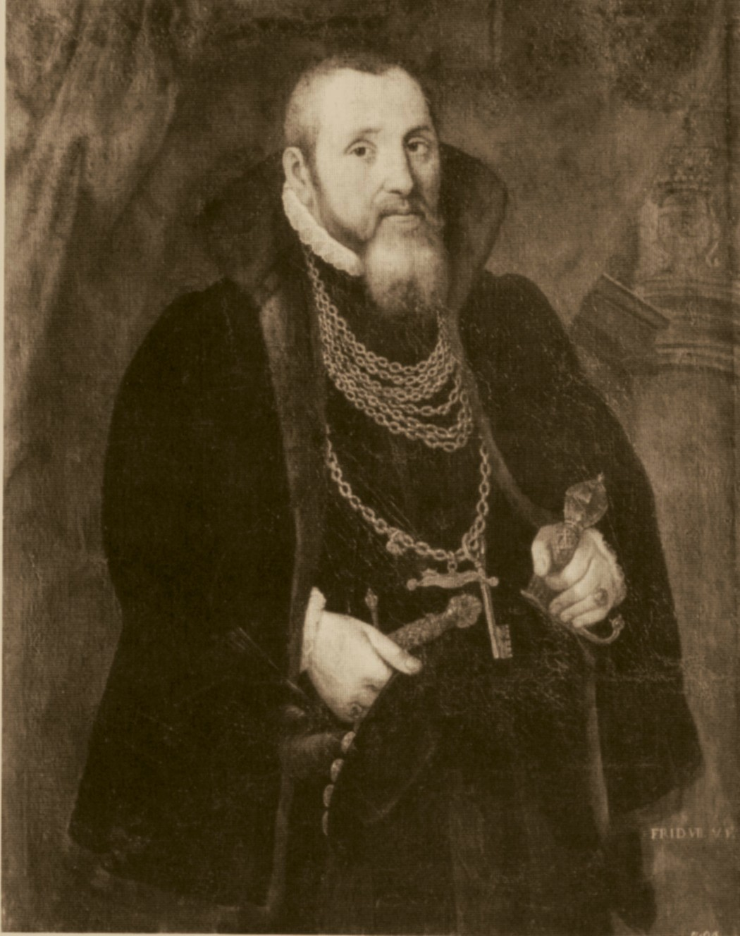 Friedrich von Fürstenberg (der Ältere)